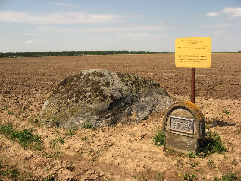 Балічы. Баліцкі валун